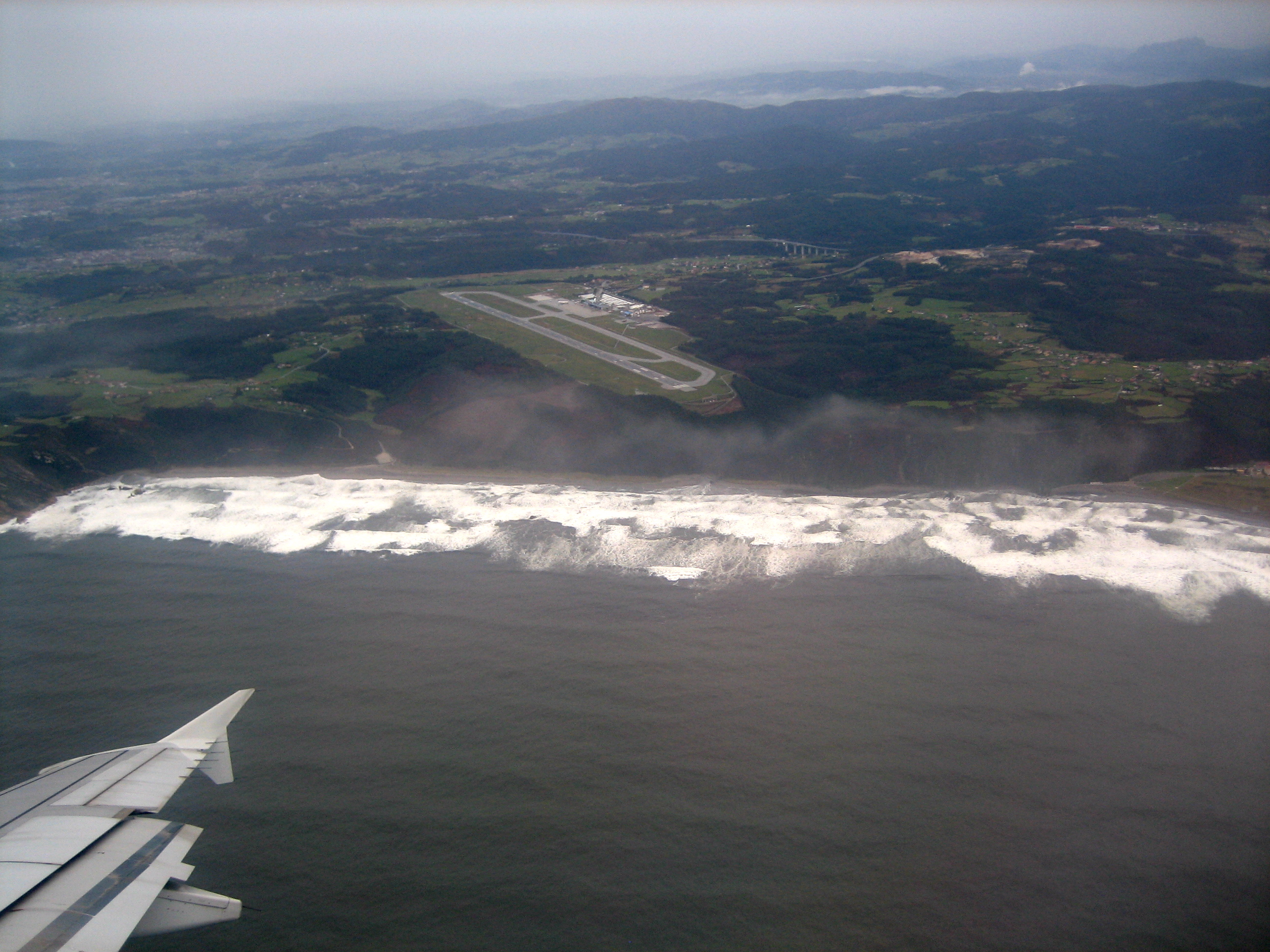 Aeropuerto de Ranón, desde el aire